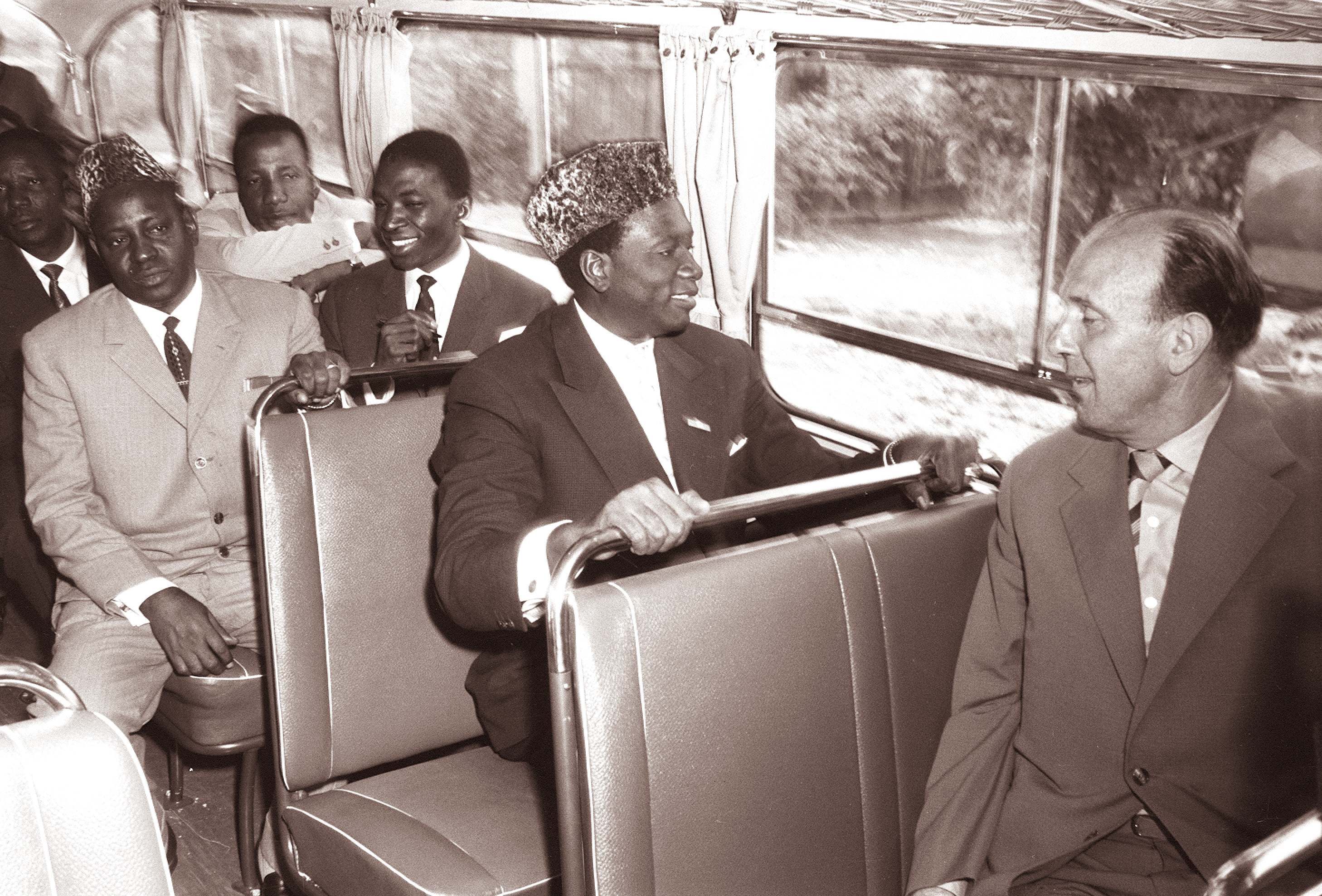 Predsednik republike Mali Modibo Keita s spremstvom v Tovarni avtomobilov in motorjev Maribor